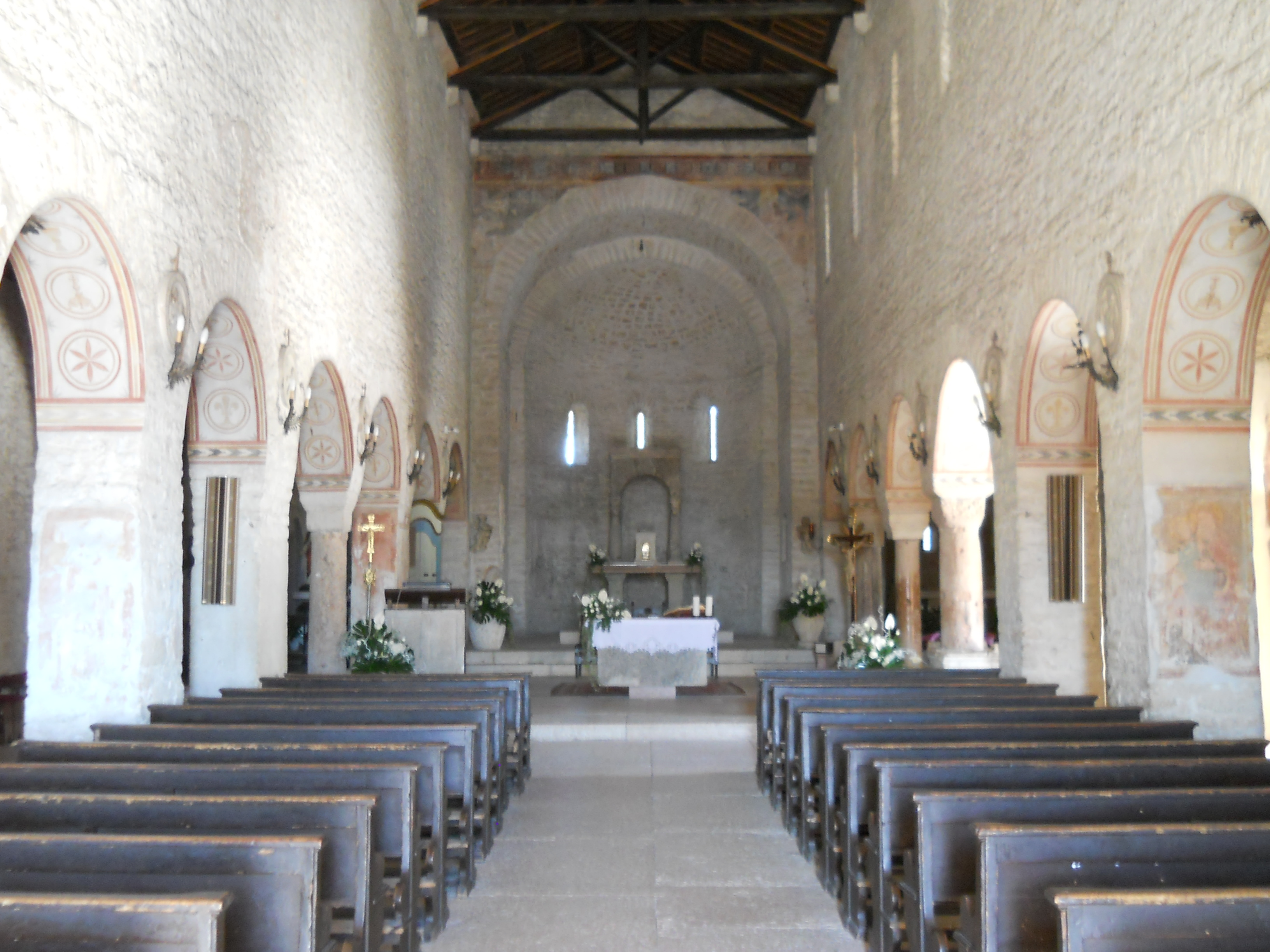 Interno della Pieve di San Giorgio